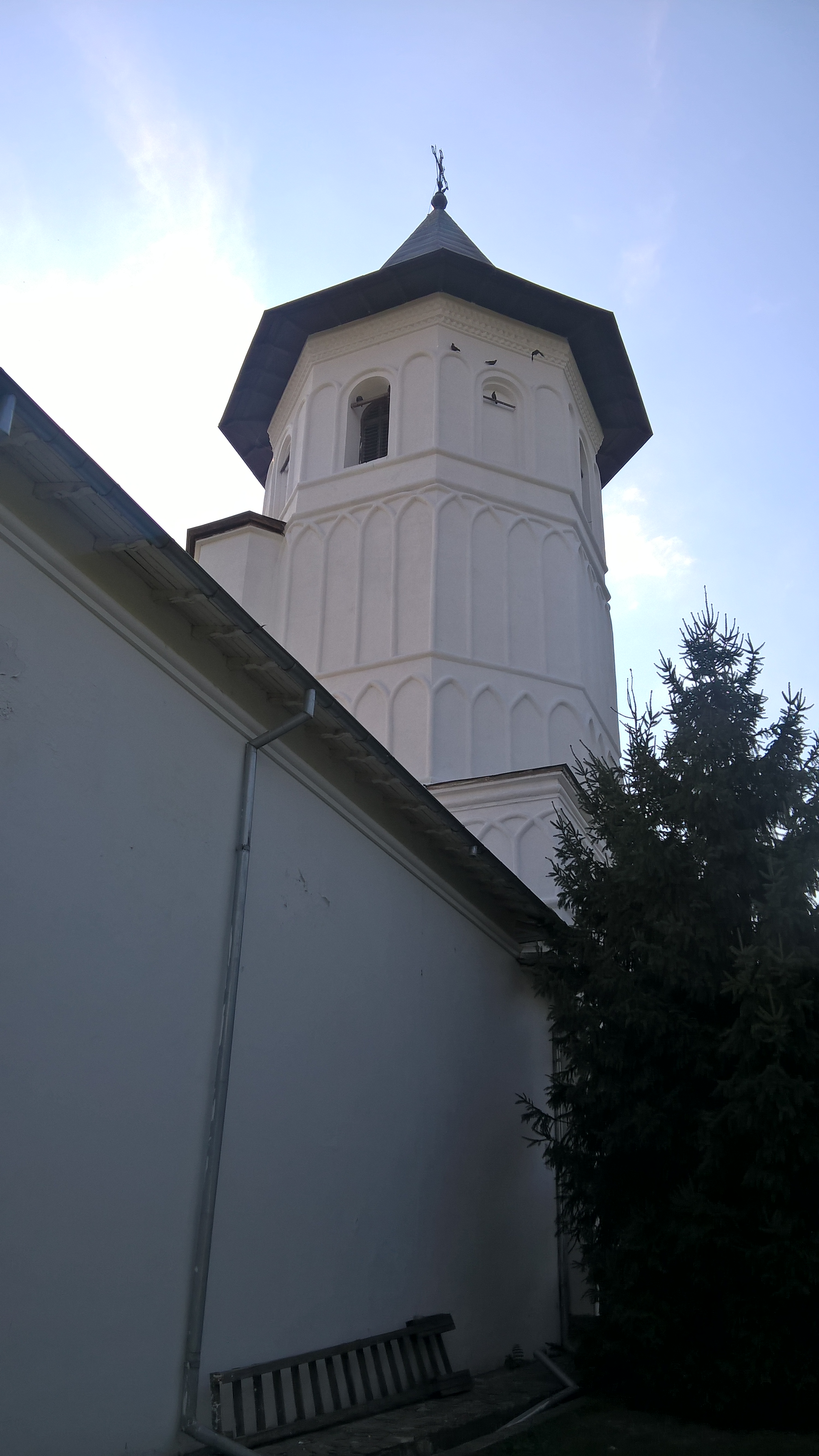 Bolnița „Sf. Arhangheli” 02